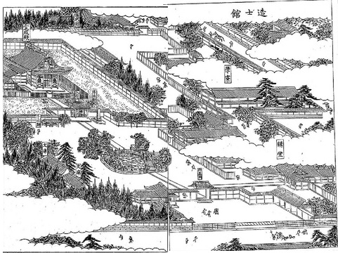 三国名勝図会第2巻「鹿児島郡一」掲載の「造士館」